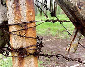 Reste der Lagerumzäunung im KZ Buchenwald